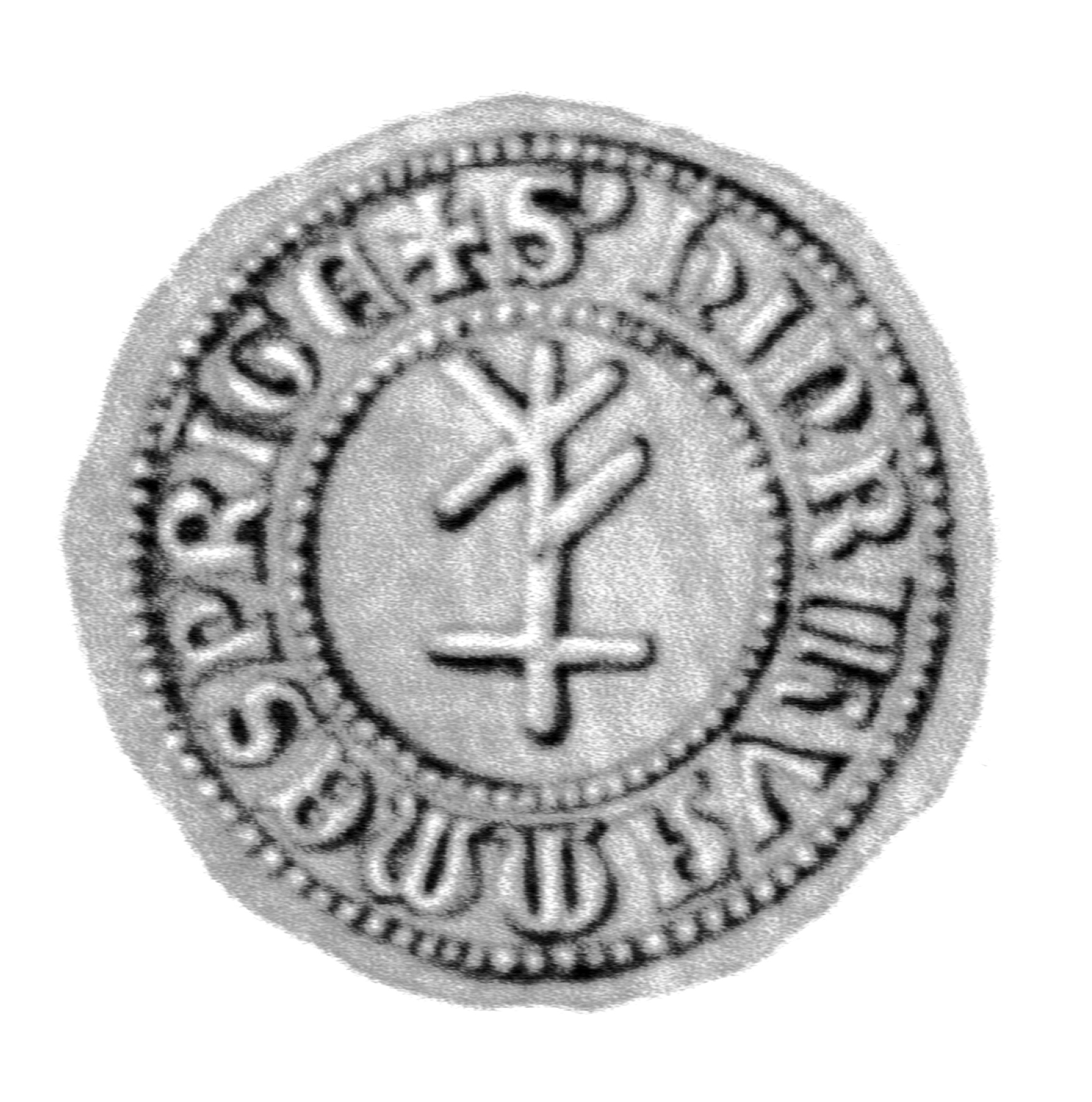 Siegel des Ratsmannes Hinrik Vamme Springe. Das Siegel stammt aus der Zeit um 1412. Siehe Emil Ferdinand Fehling: Lübeckische Ratslinie, Nr. 470 (Heinrich von dem Springe).